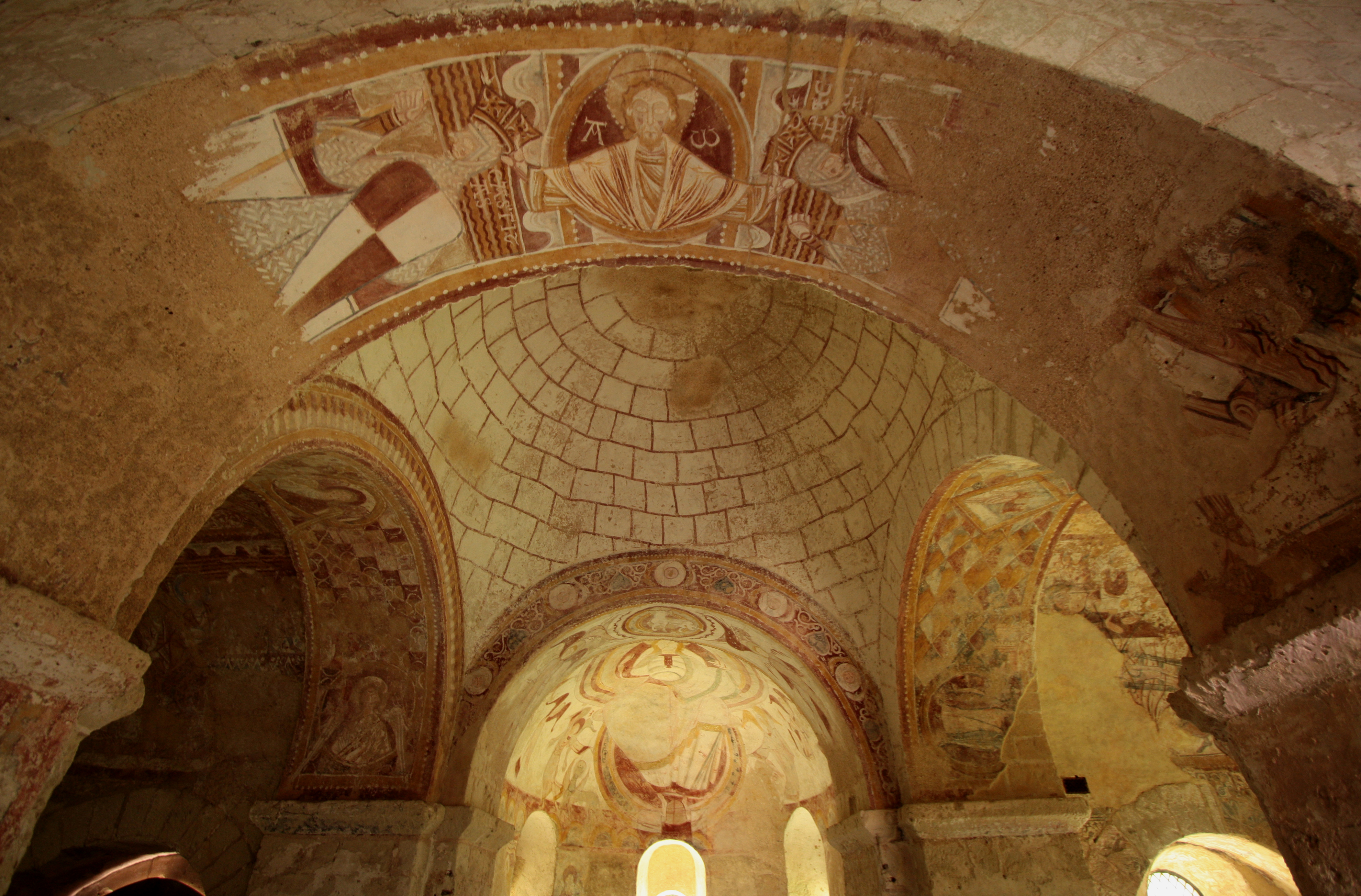 Montoire-sur-le-Loir im Département Loir-et-Cher/Frankreich - Ausmalungen der Kapelle Saint-Gilles aus der romanischen Stilepoche.